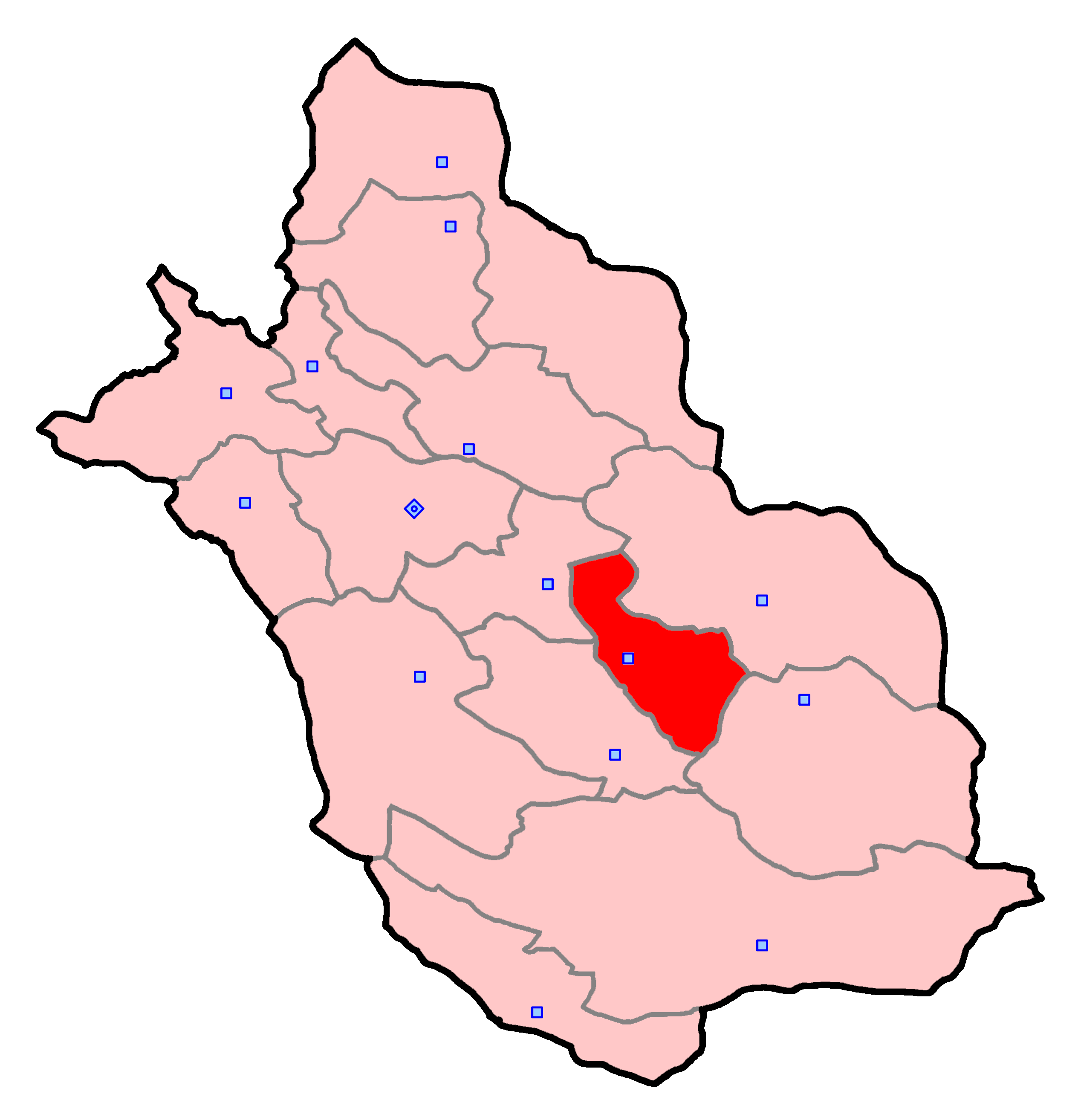 حوزهٔ انتخاباتی فسا برای انتخابات مجلس شورای اسلامی